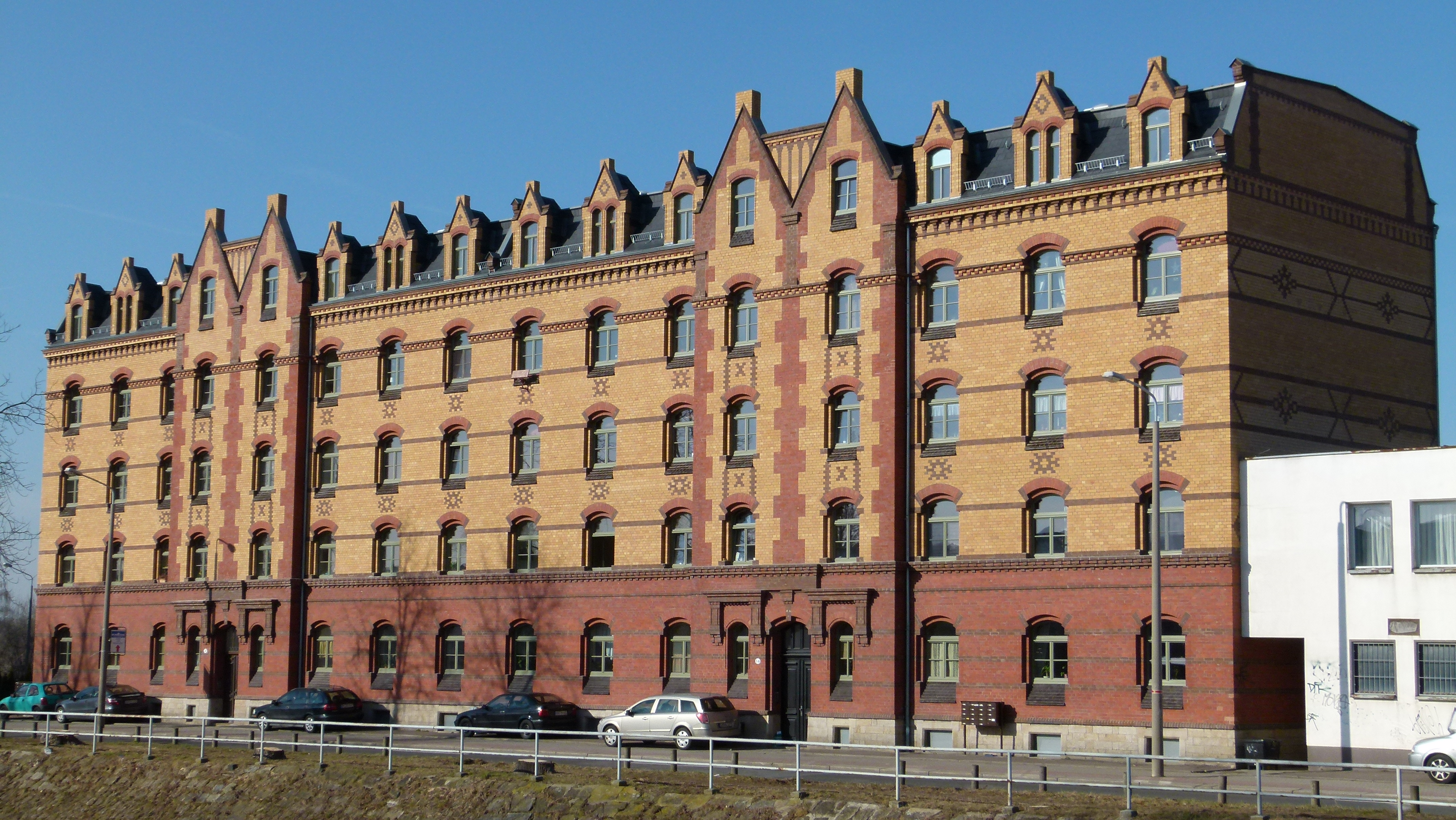 Denkmalgeschütztes Haus, Emerich-Ambros-Ufer 54-56, Friedrichstadt, Dresden